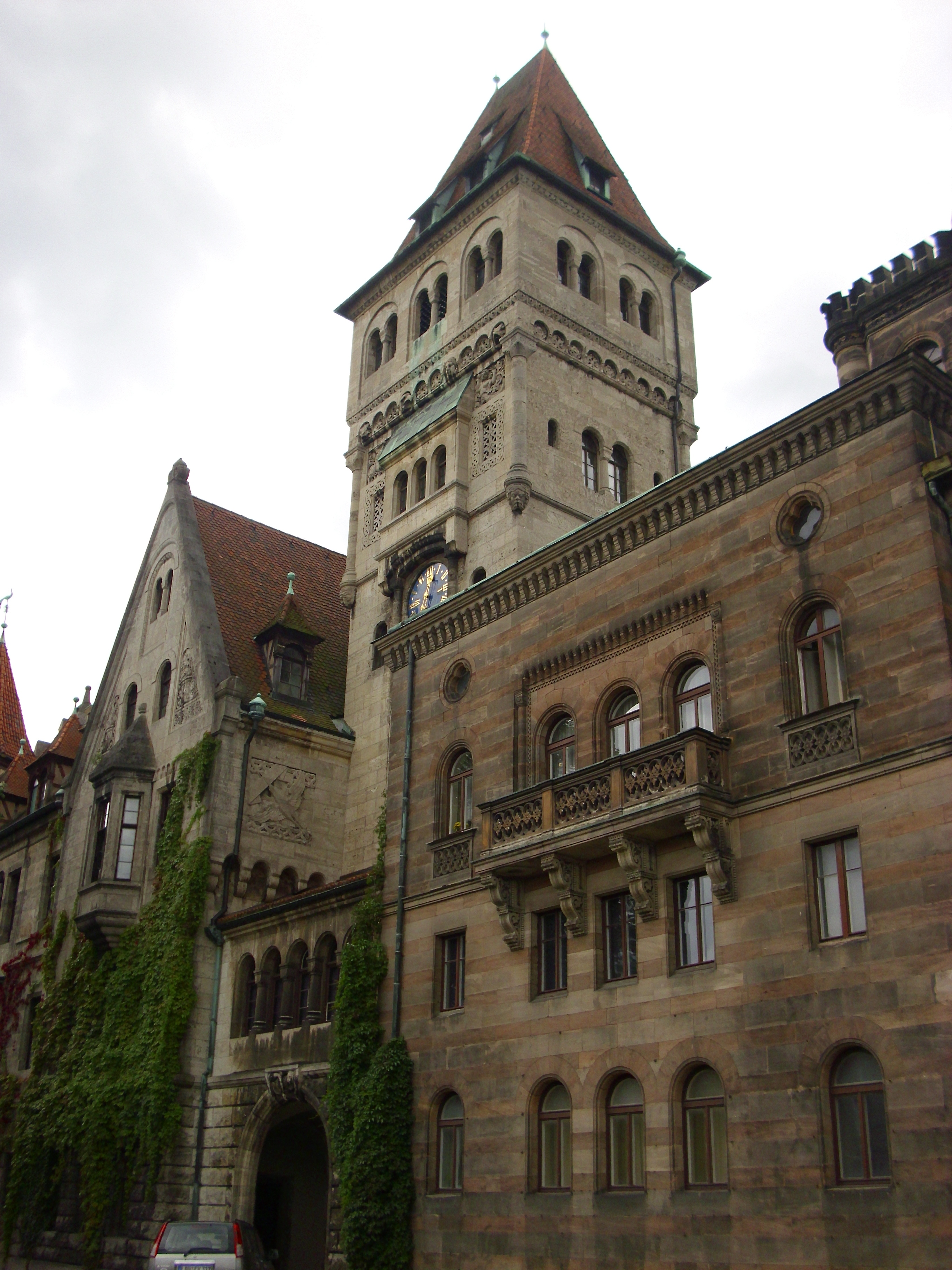 Faberschloss mit Park und anliegenden Villen Ende August 2010 13